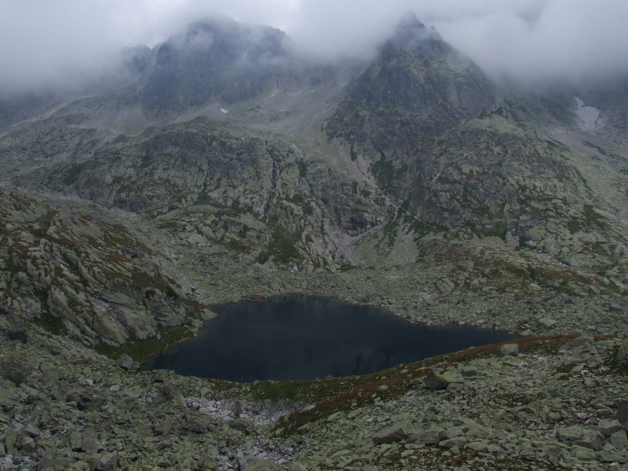 Wyżni Staw Spiski